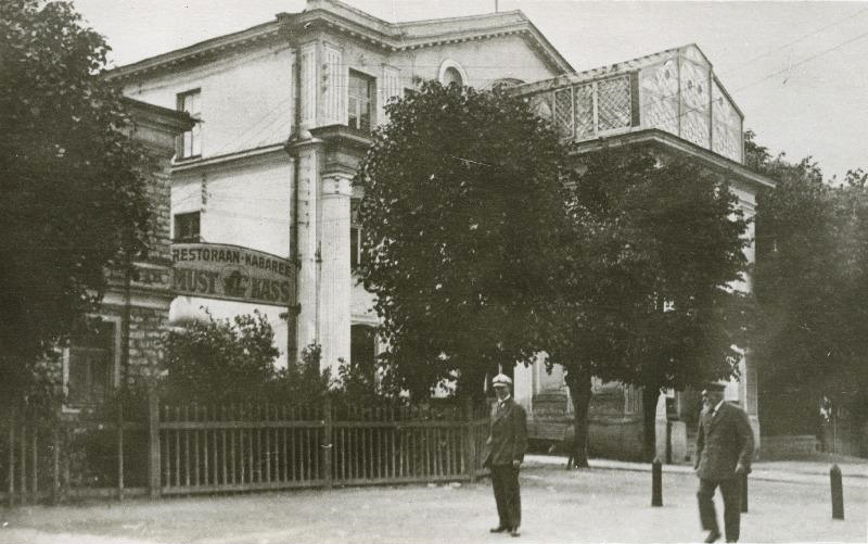 Кинотеатр Grand Marina и ночной ресторан-кабаре Must Kass, Таллин, 1920 год